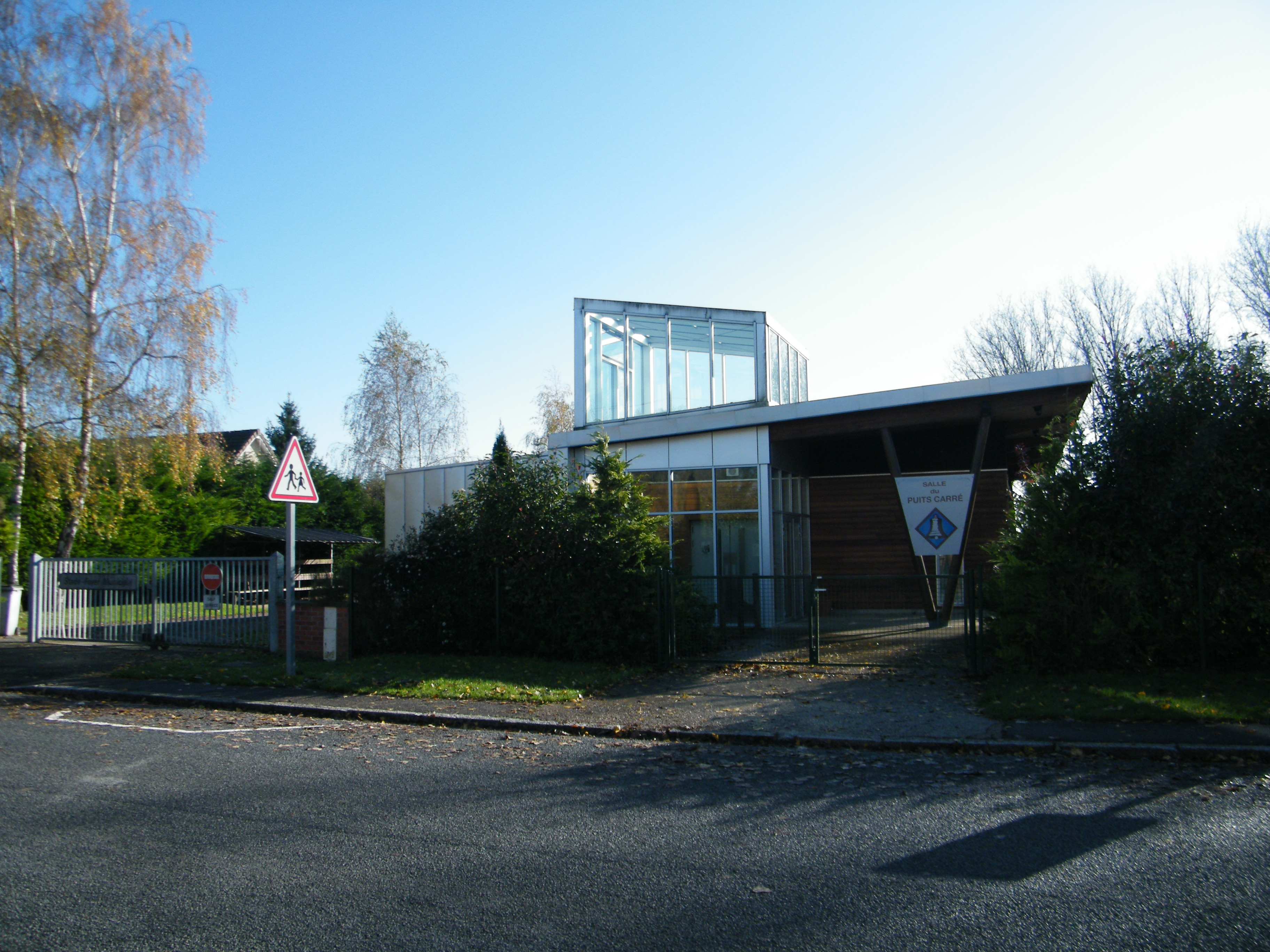 Salle du puits carré à Carrépuis.